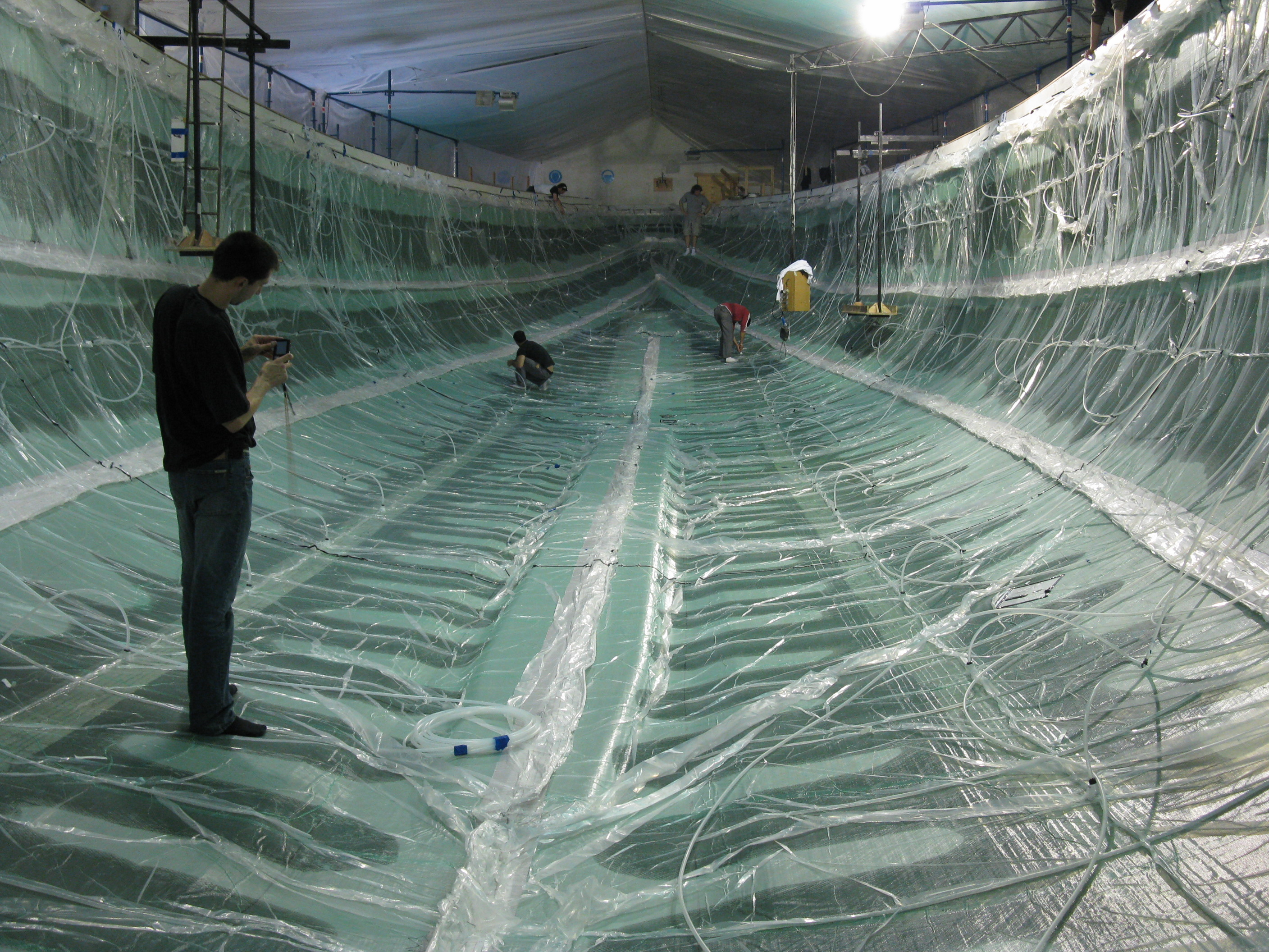 Goélette de 172' (52m) Surface : 600m² Infusée par Loïc Vénec